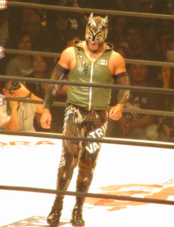 2016.11.3大阪